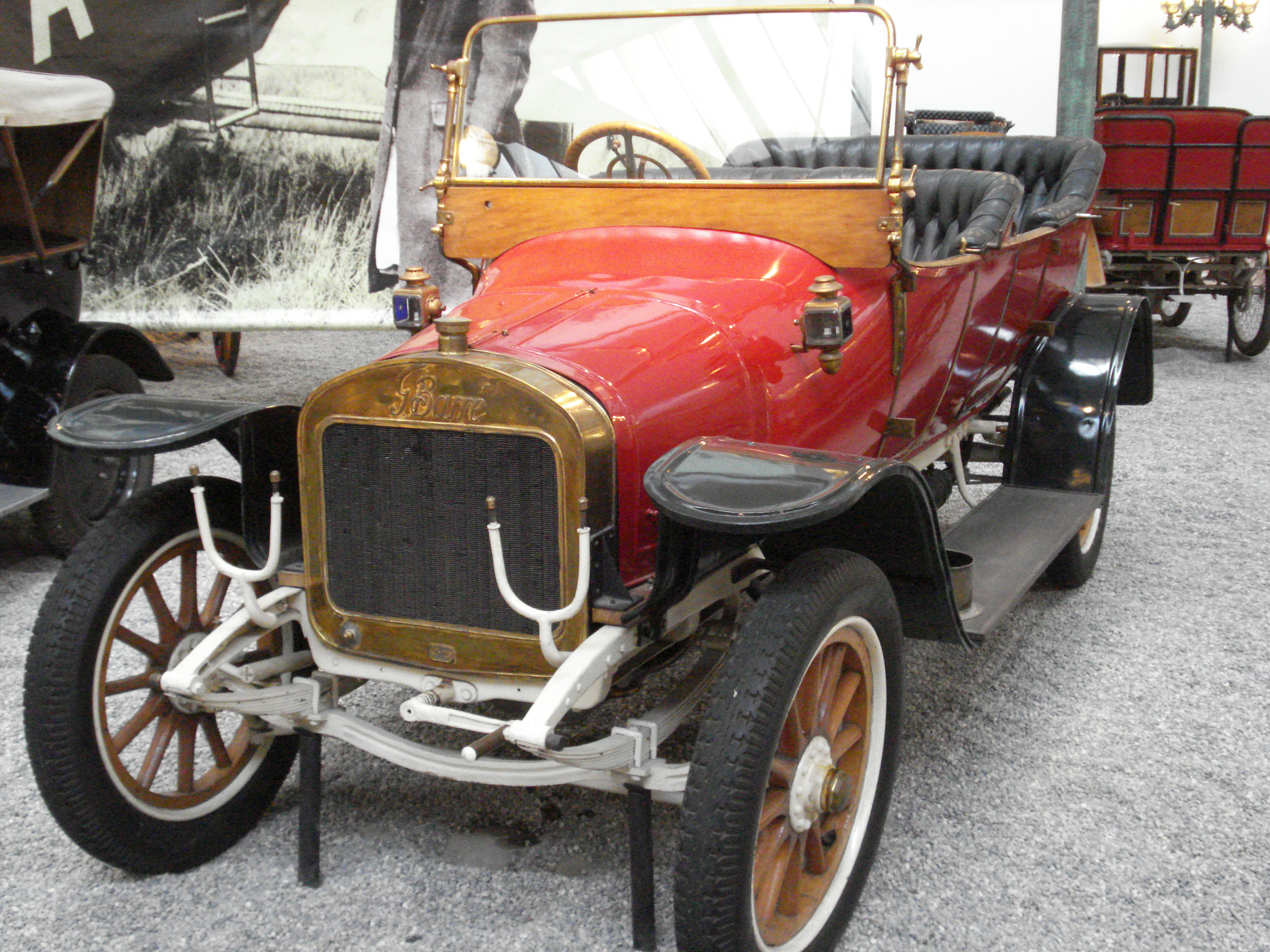 Cité de l’Automobile